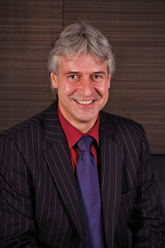 Ralf Borngräber, Landtagsabgeordneter Niedersachsen, 16. Wahlperiode (Fotoprojekt Landtagsabgeordnete Niedersachsen am 24. und 25. November 2009)